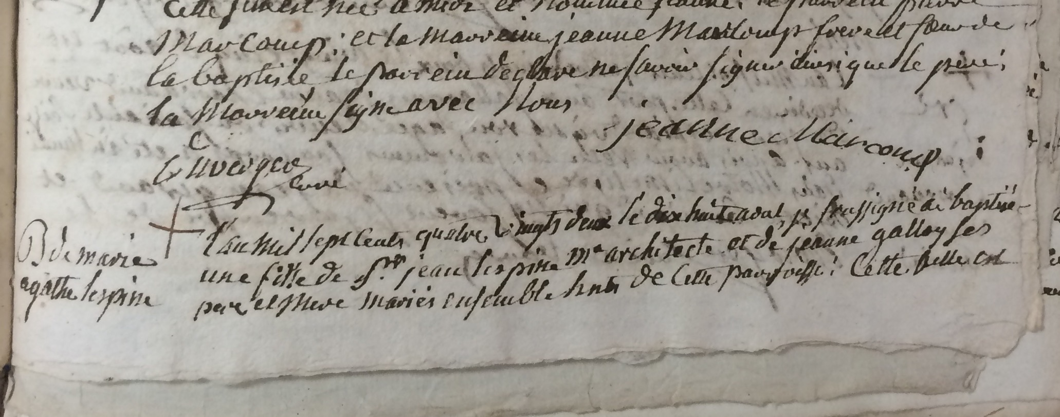 Archives - Mairie de Bourg (Gironde) - Baptême de Marie-Agathe, fille Jean Lespine Maître Architecte et Jeanne Gallois